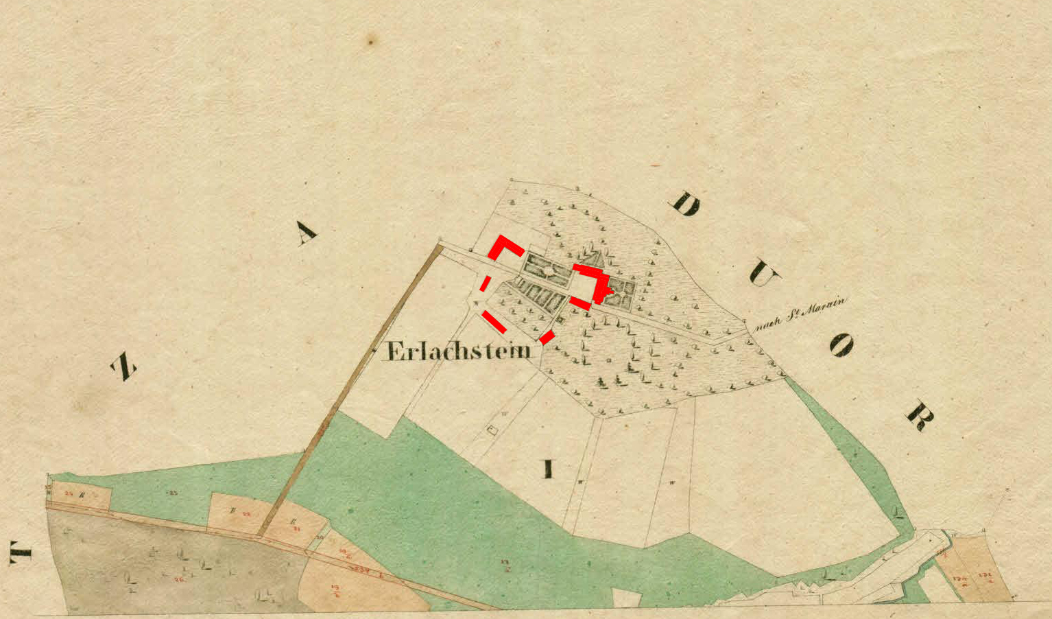 Franciscejski kataster za Štajersko, 1823-1869